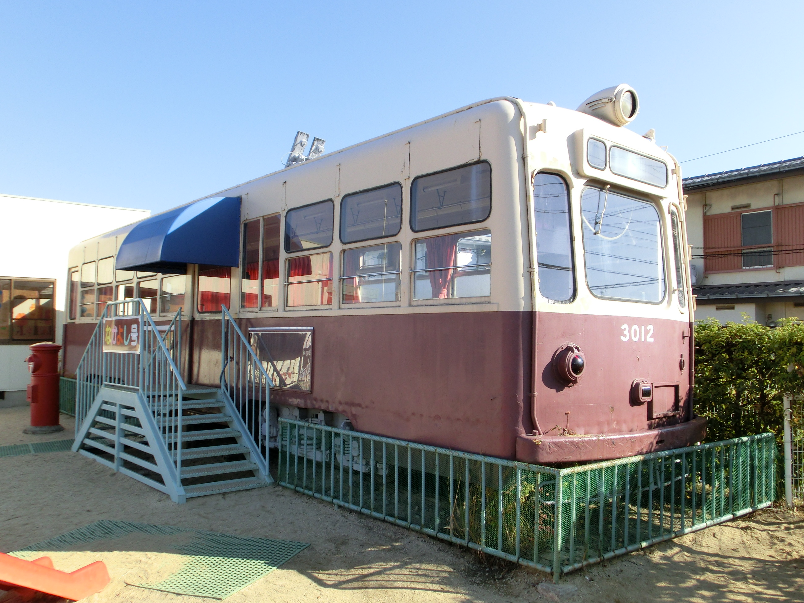 大阪市電3001形3012号